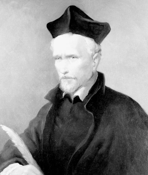 Detalle de un retrato de Alonso de Ovalle (Santiago;27 de julio de 1603 - Lima; mayo de 1651). Cronista chileno, autor de la "Histórica relación del Reyno de Chile".